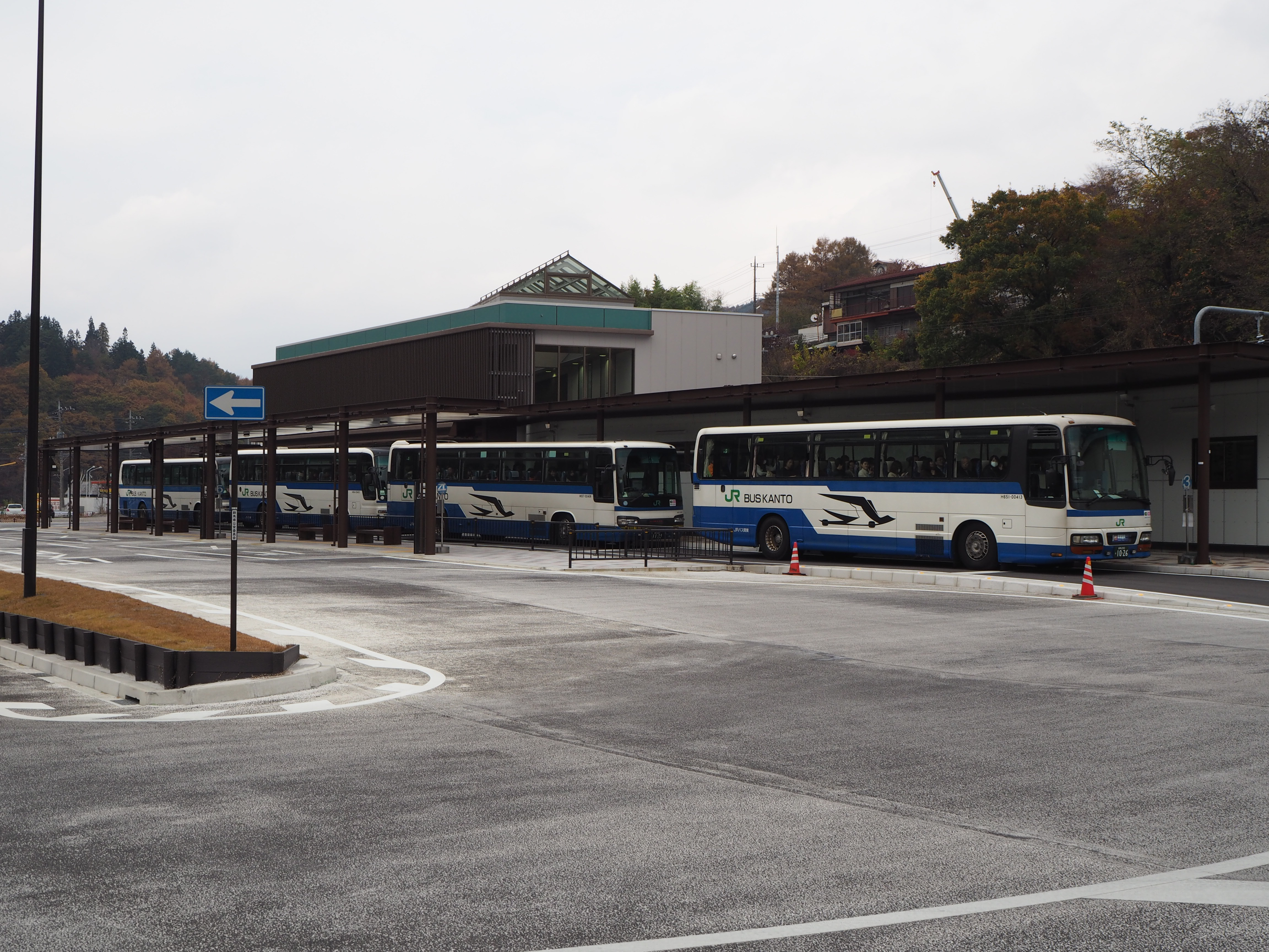 長野原草津口駅バスターミナル